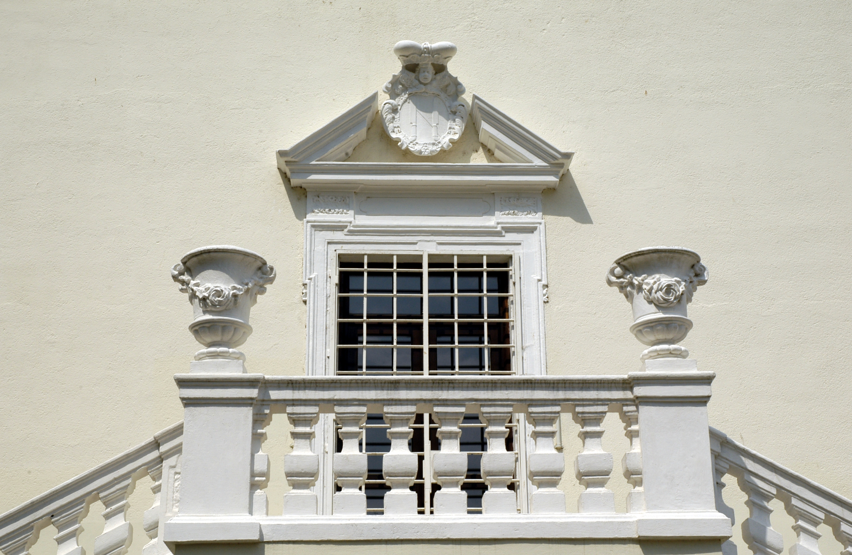 ehemaliges Schloss Sonnberg, Justizanstalt, Detail der Südfassade mit Wappenkartusche Dietrichstein